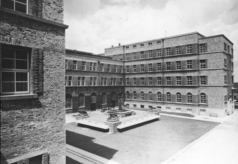 Innenhof des Hauptlabors E. Merck, Darmstadt